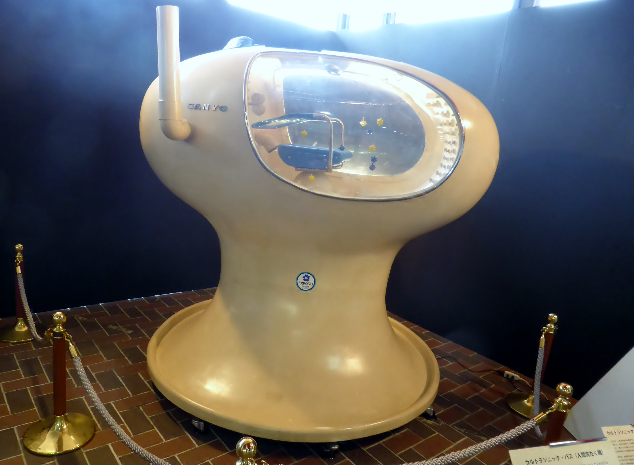 三洋電機の人間洗濯機を撮影。